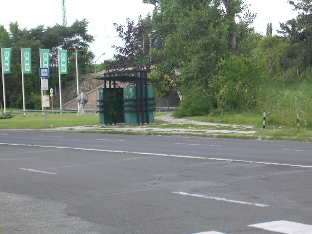 DCM főbejárat nevű autóbusz megálló, Vác (2-es főút)